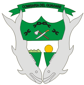 Escut de la comisària de Guaviare, Colòmbia